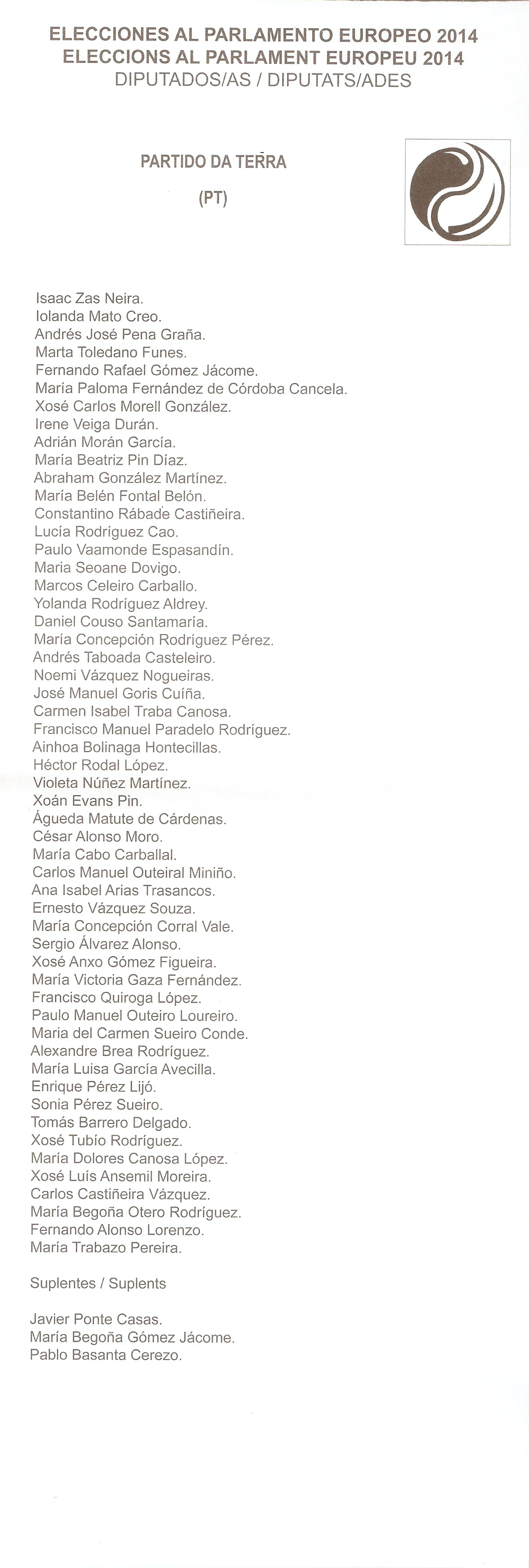 Papeleta del Partido da Terra para las elecciones europeas de 2014. Edición para Cataluña.